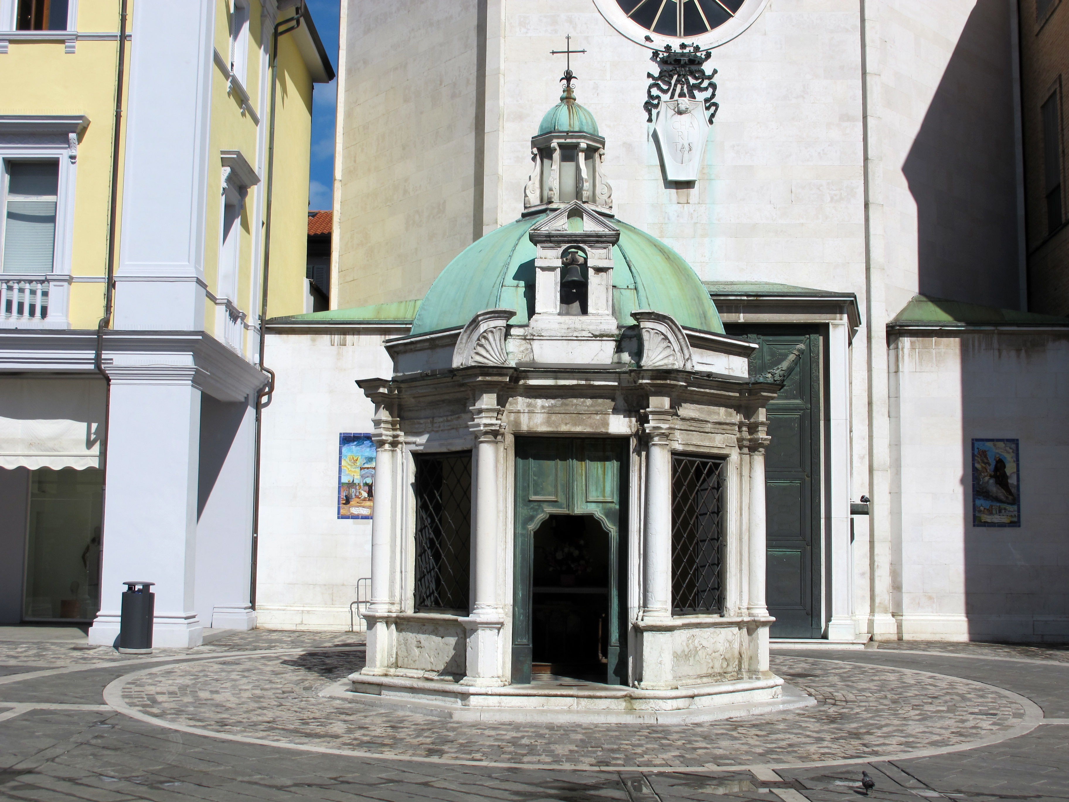 Tempietto di S. Antonio - MIBAC This is a photo of a monument which is part of cultural heritage of Italy.